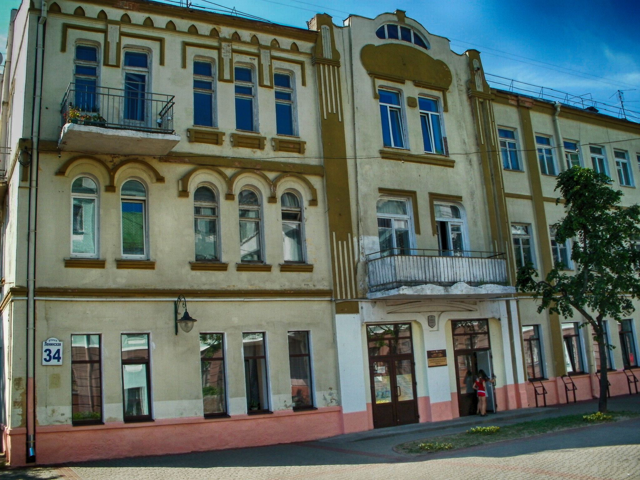 Беларуская (тарашкевіца): Магілеў, вуліца Ленінская (былая Ветраная) і яе забудова